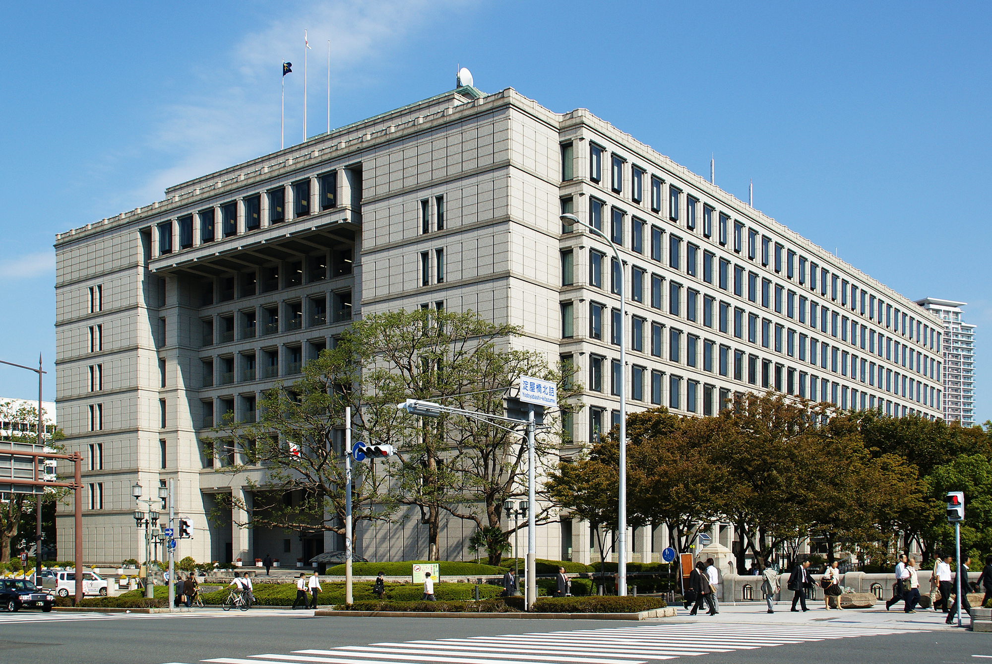 Osaka City Hall.(Kita Ward, Osaka City, Osaka Prefecture, Japan)